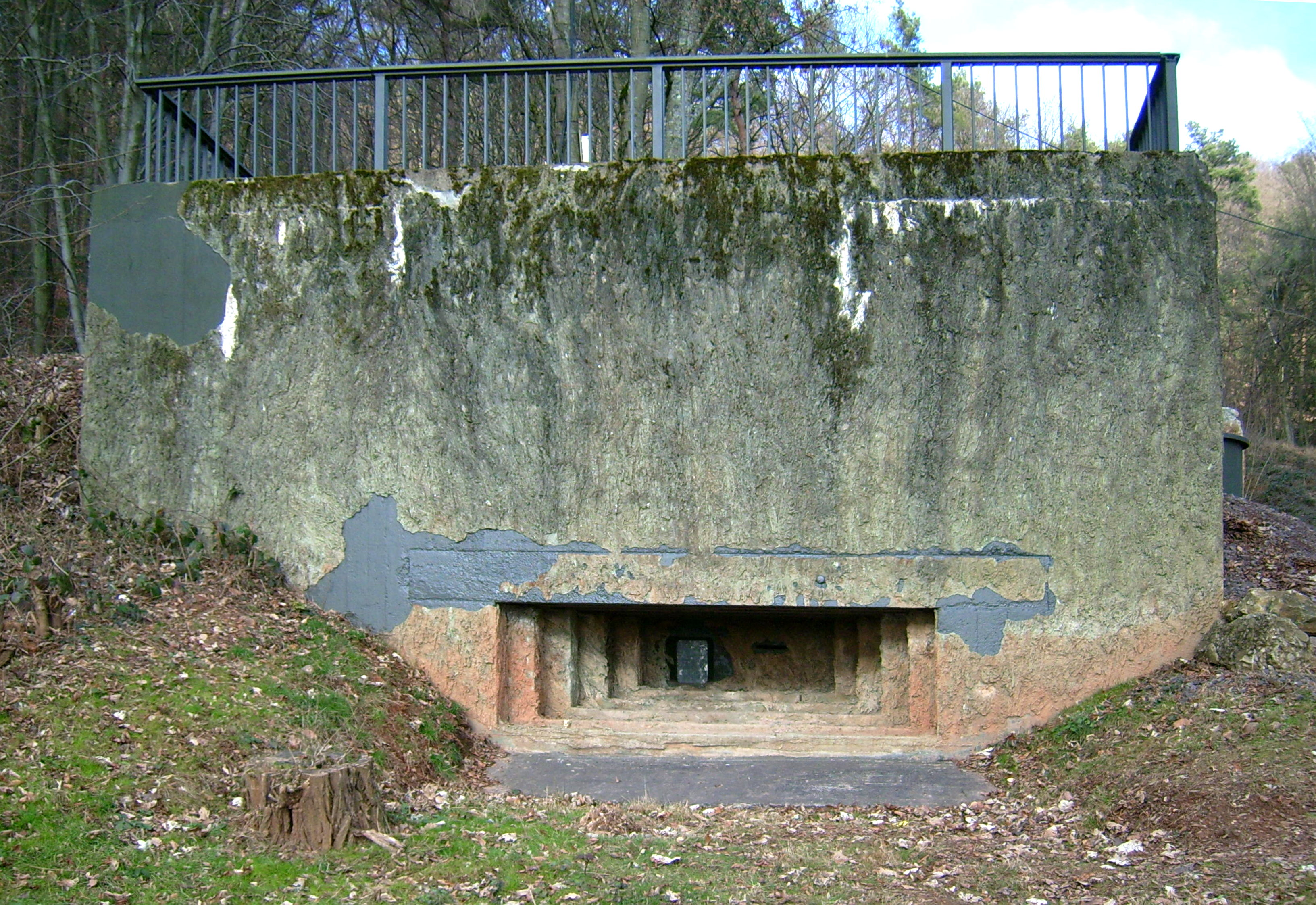 Holztreppe am Litermont